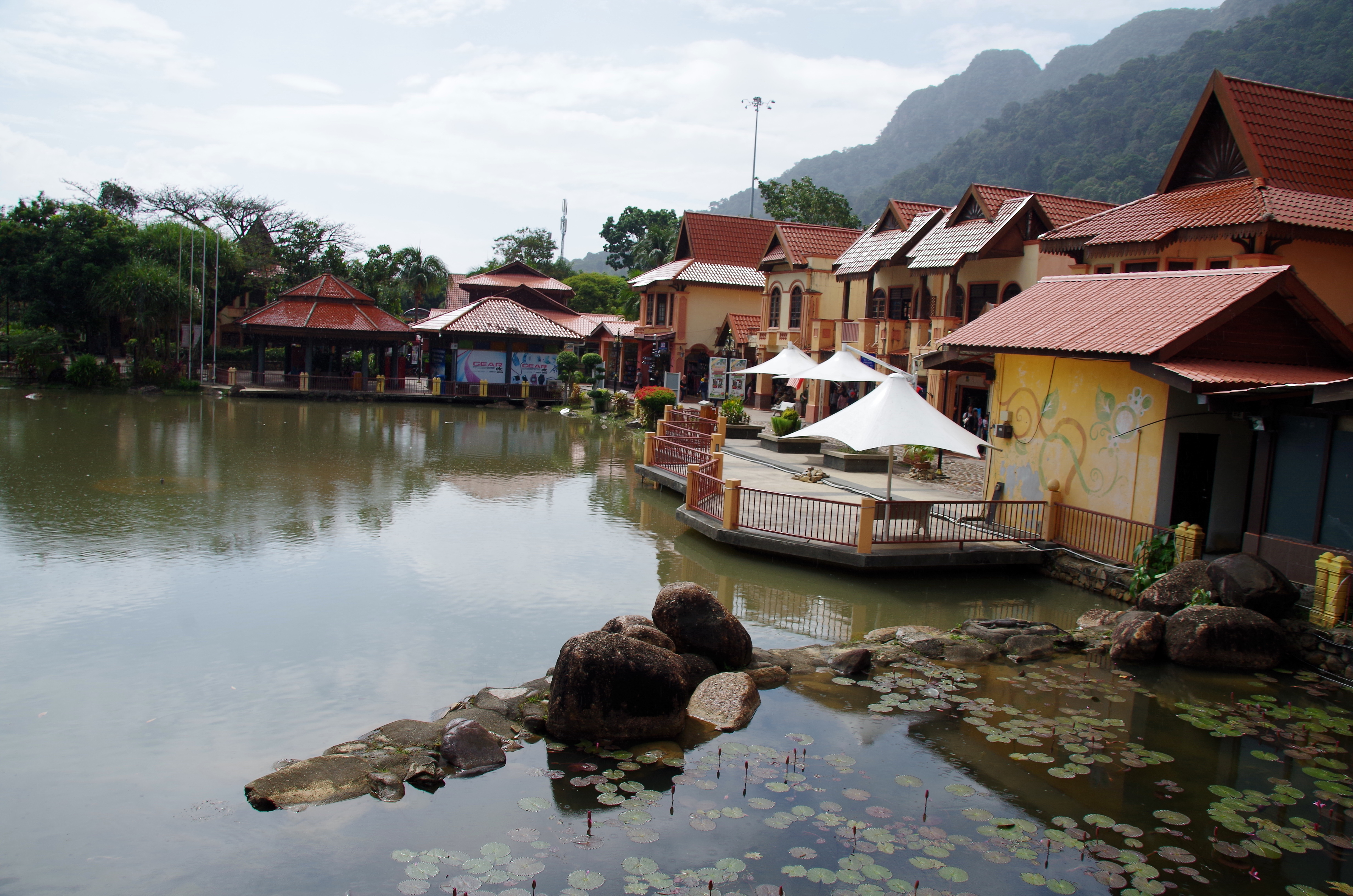 Langkawi Oriental Village